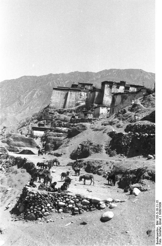 Rimpung Tal, Ortschaft und Burg